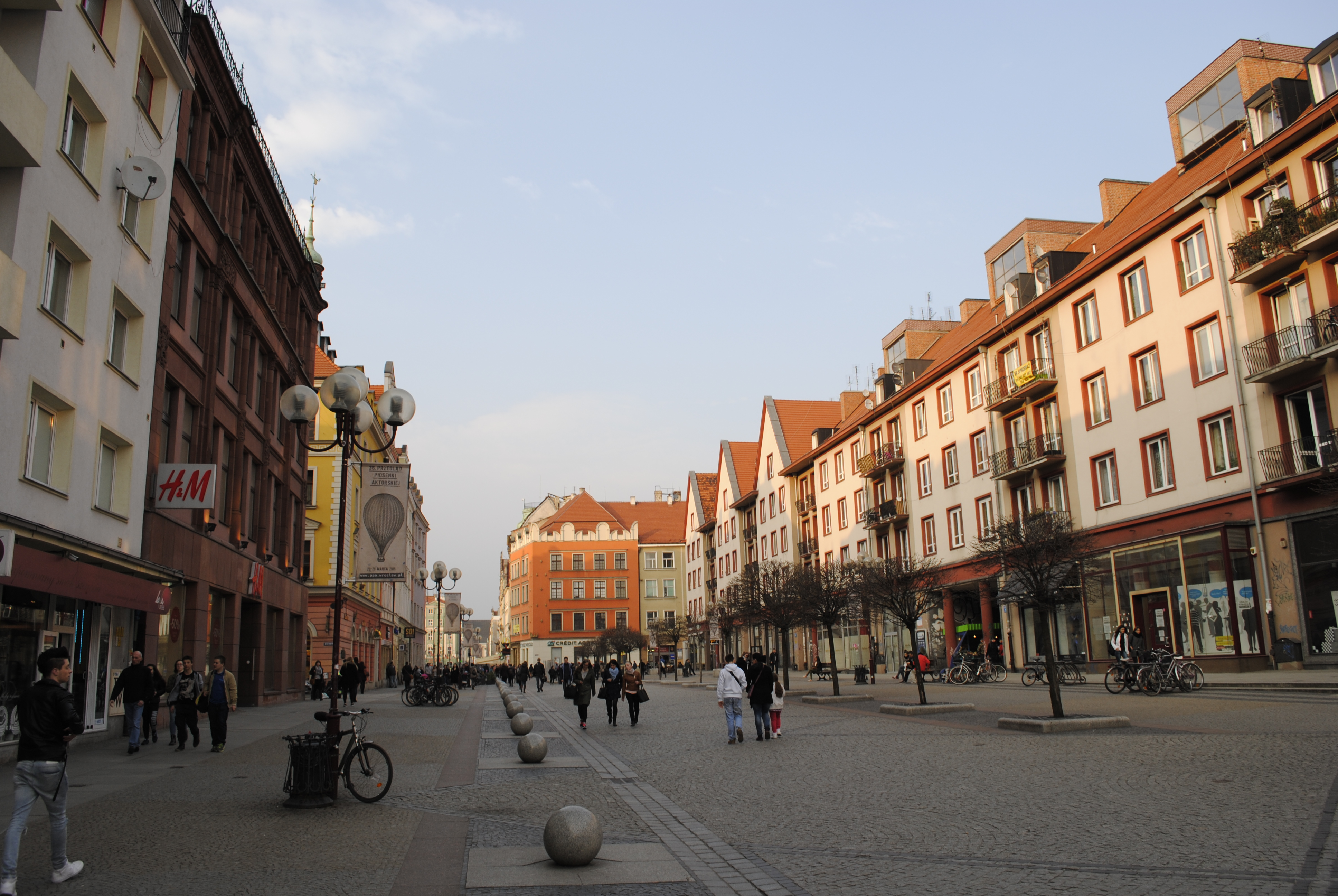 Nordpart der Schweidnitzer Straße